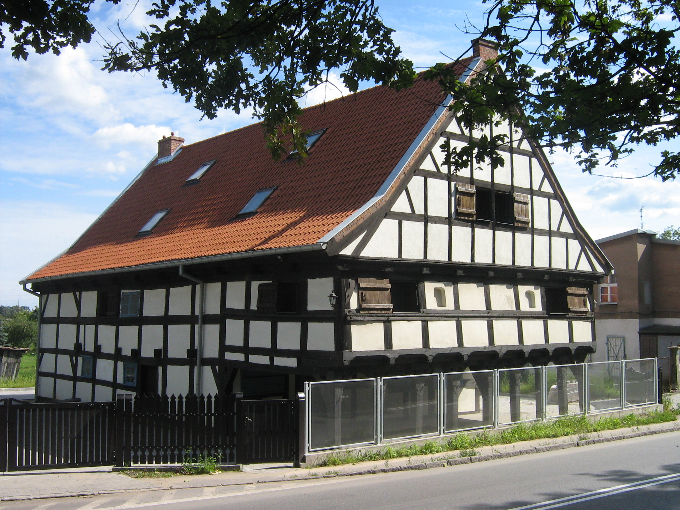 Gdańsk Lipce, Trakt św. Wojciecha 297 - dom podcieniowy (Lwi Dwór), poł. XVII